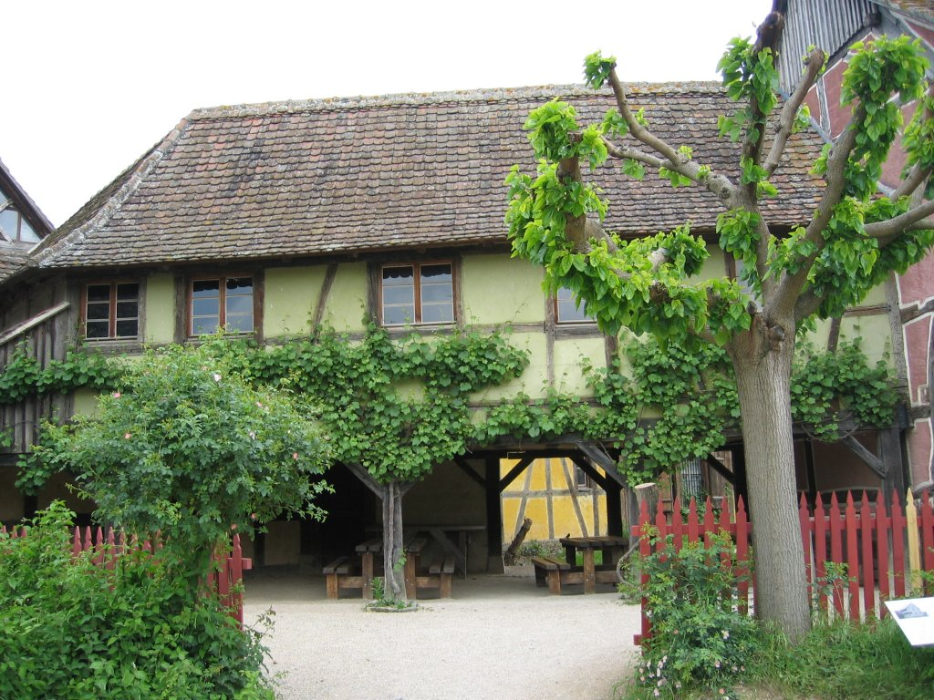 Ecomusée d'Alsace